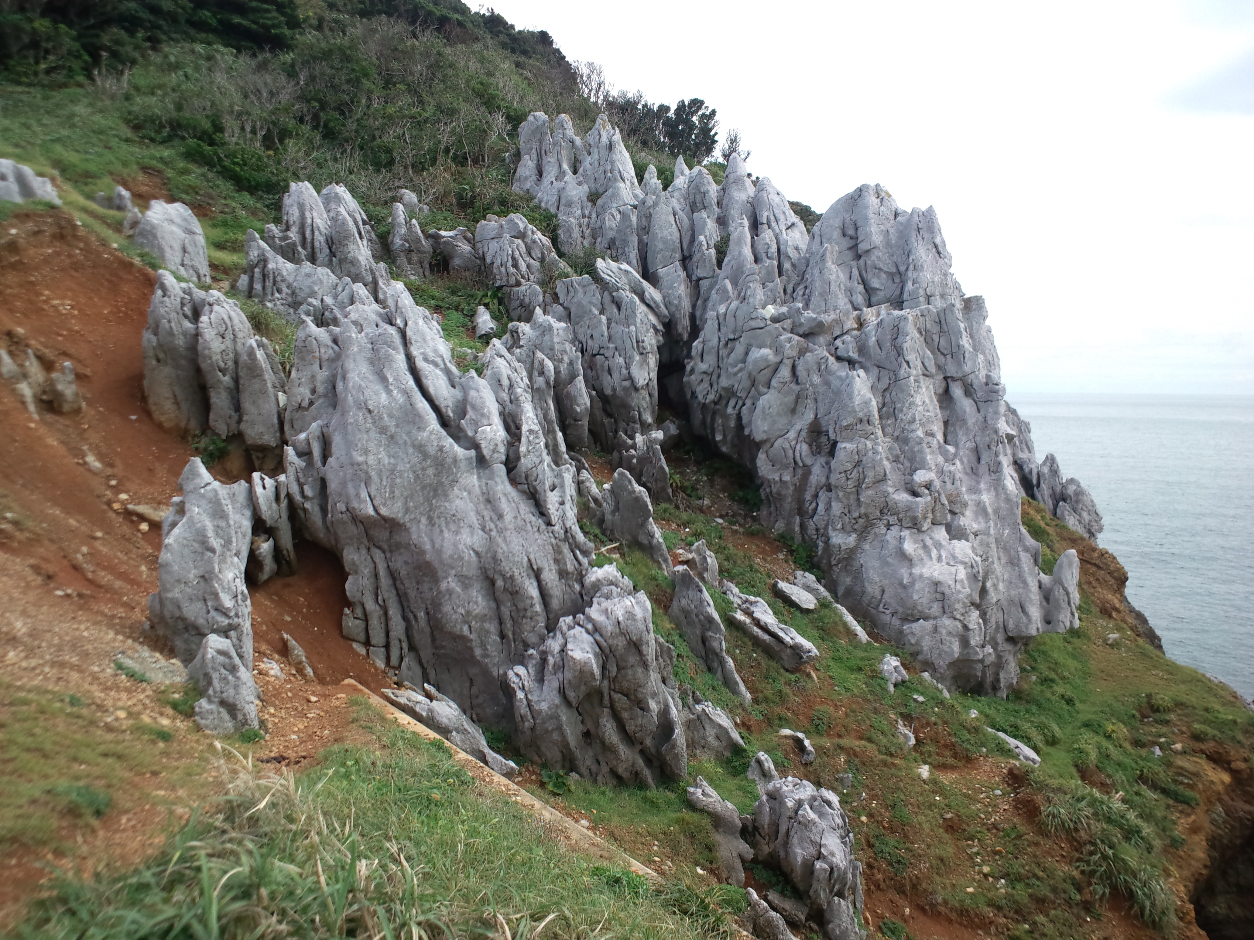 神島（三重県） カルスト地形